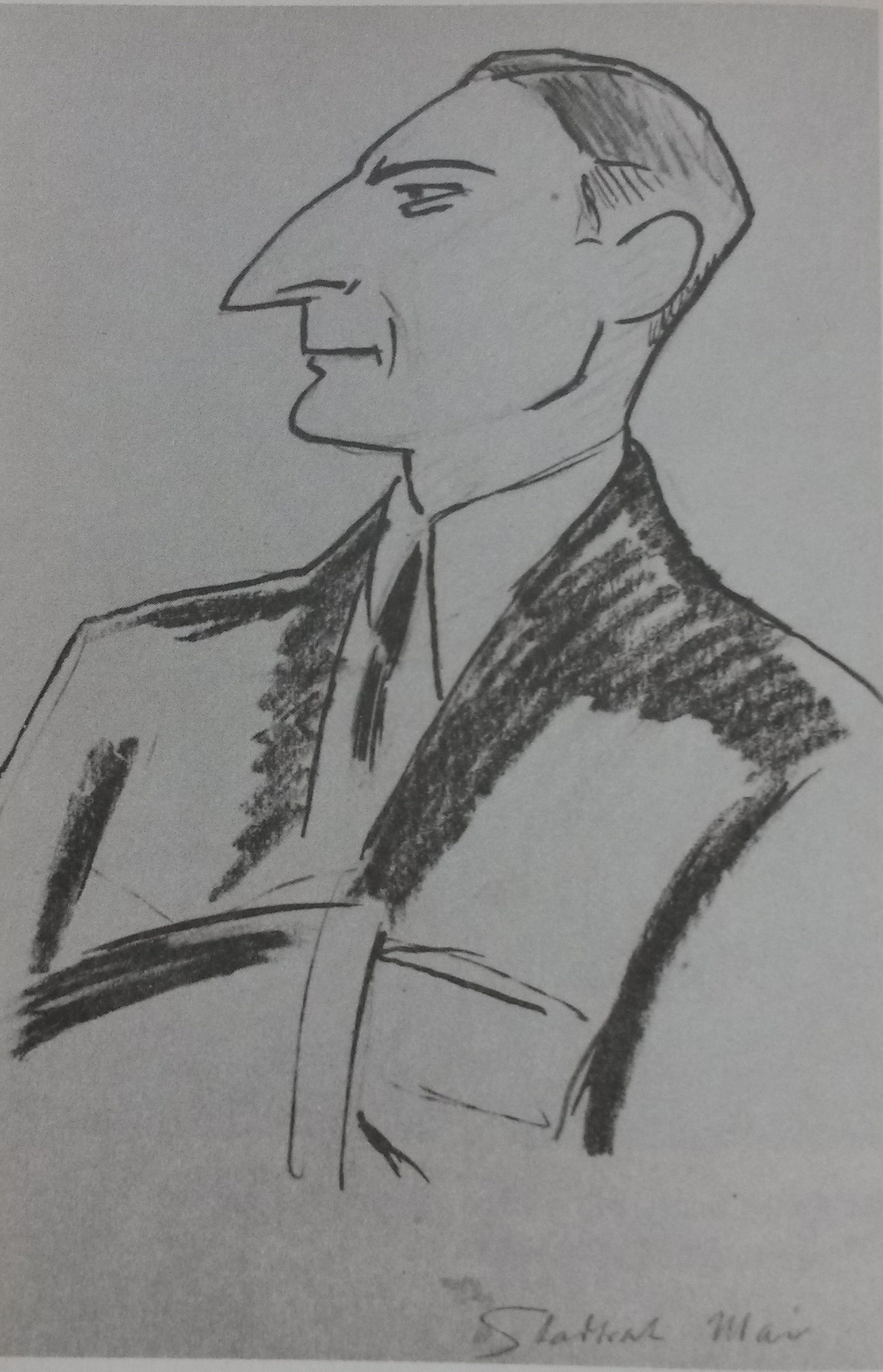 Darstellung von Ernst May durch Lino Salini.